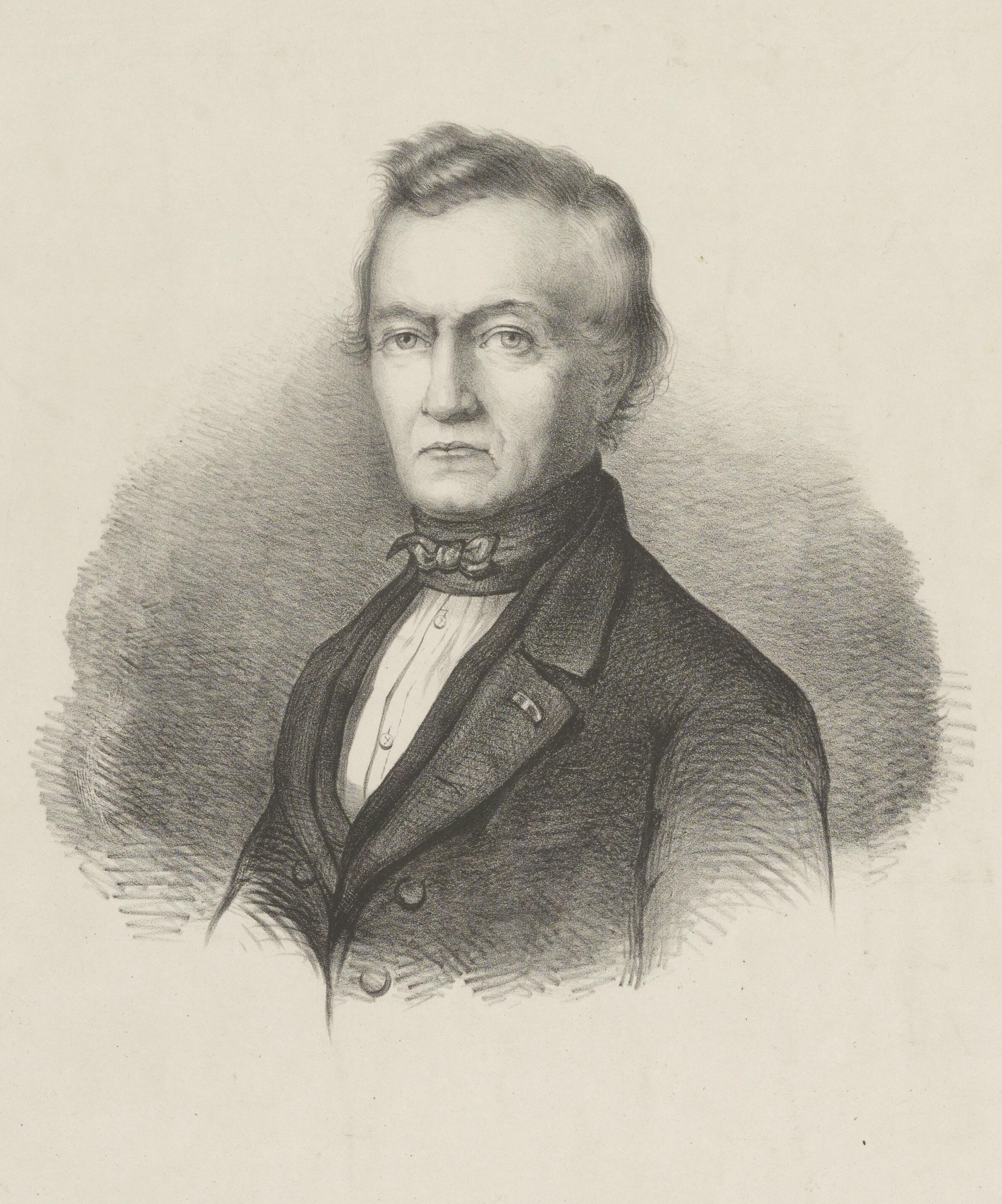 Joast Hiddes Halbertsma (1789-1869)